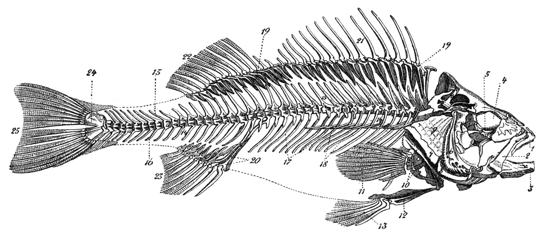 Título original: "Fig. 228. Esqueleto de una perca. 1 Maxilar, 2 Arco hioideo, 3 Dentario, 4 Órbita ocular, 5 Hueso de la órbita ocular, 6 Preopercular, 7 Subopercular, 8 Interopercular, 9 Opercular, 10 Huesos de la cintura escapular, 11 Aletas pectorales, 12 Huesos de la cintura pélvica, 13 Aletas ventrales, 14 Columna vertebral, 15 Apófisis vertebral superior, 16 Apófisis vertebral inferior, 17 Costillas ventrales, 18 Costillas dorsales, 19 Pterigóforos de las aletas dorsales, 20 Pterigóforos de la aleta anal, 21 Espinas de la aleta dorsal, 22 Radios de la aleta dorsal, 24 Placa caudal, 25 Aleta caudal.".